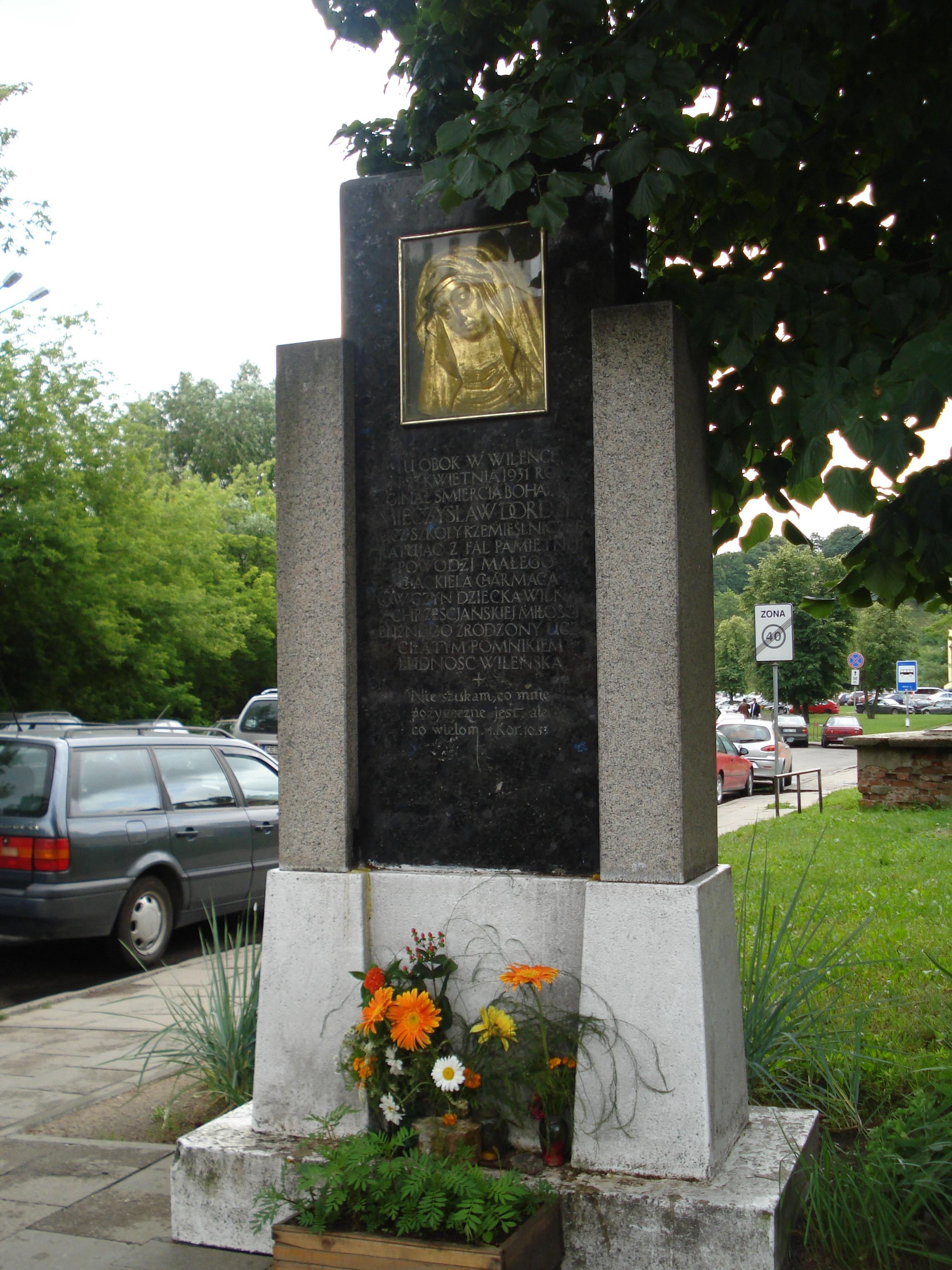 Monument of Mieczyslaw Dordzik in Vilnius. 1933